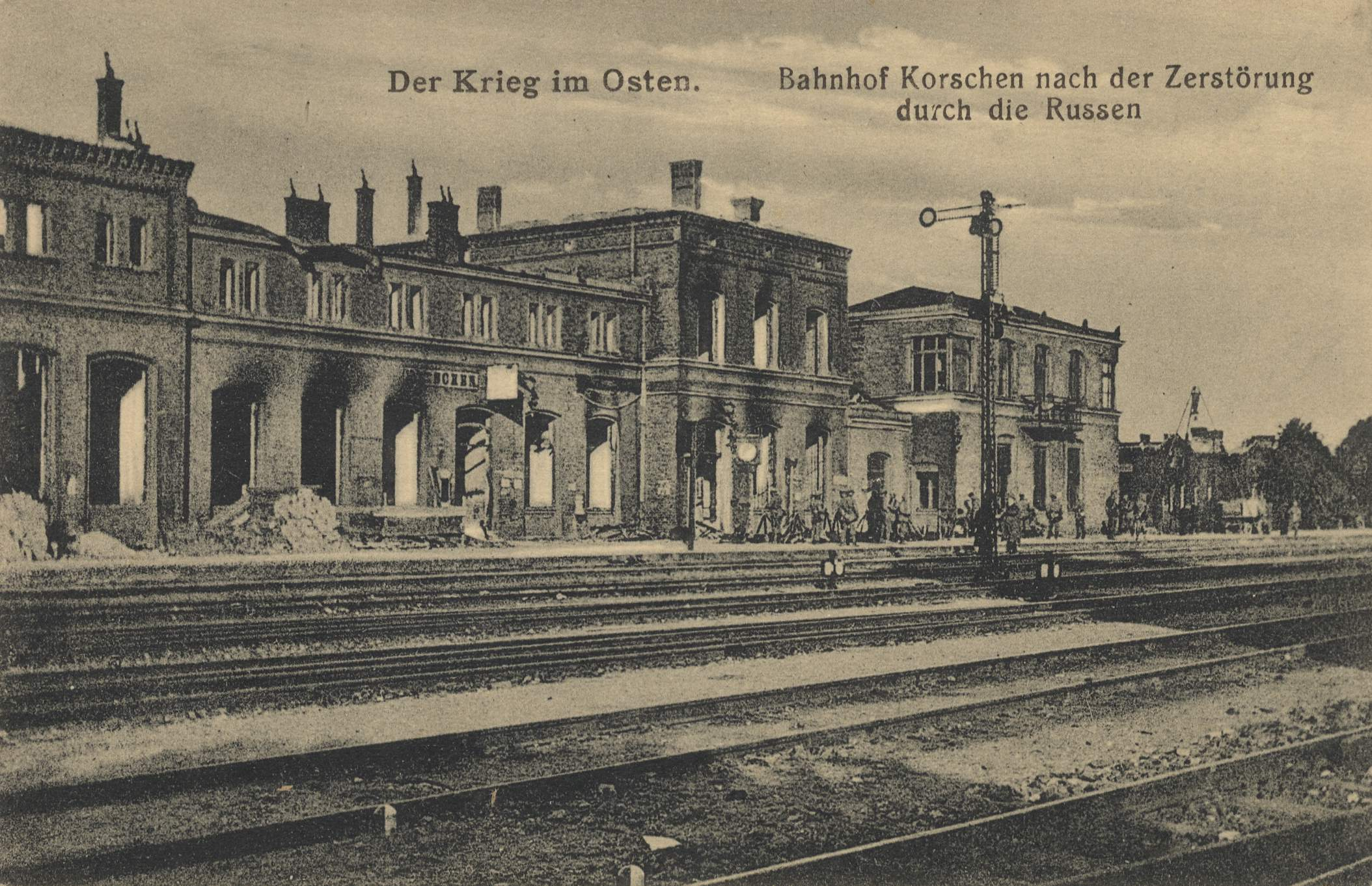 Bahnhof